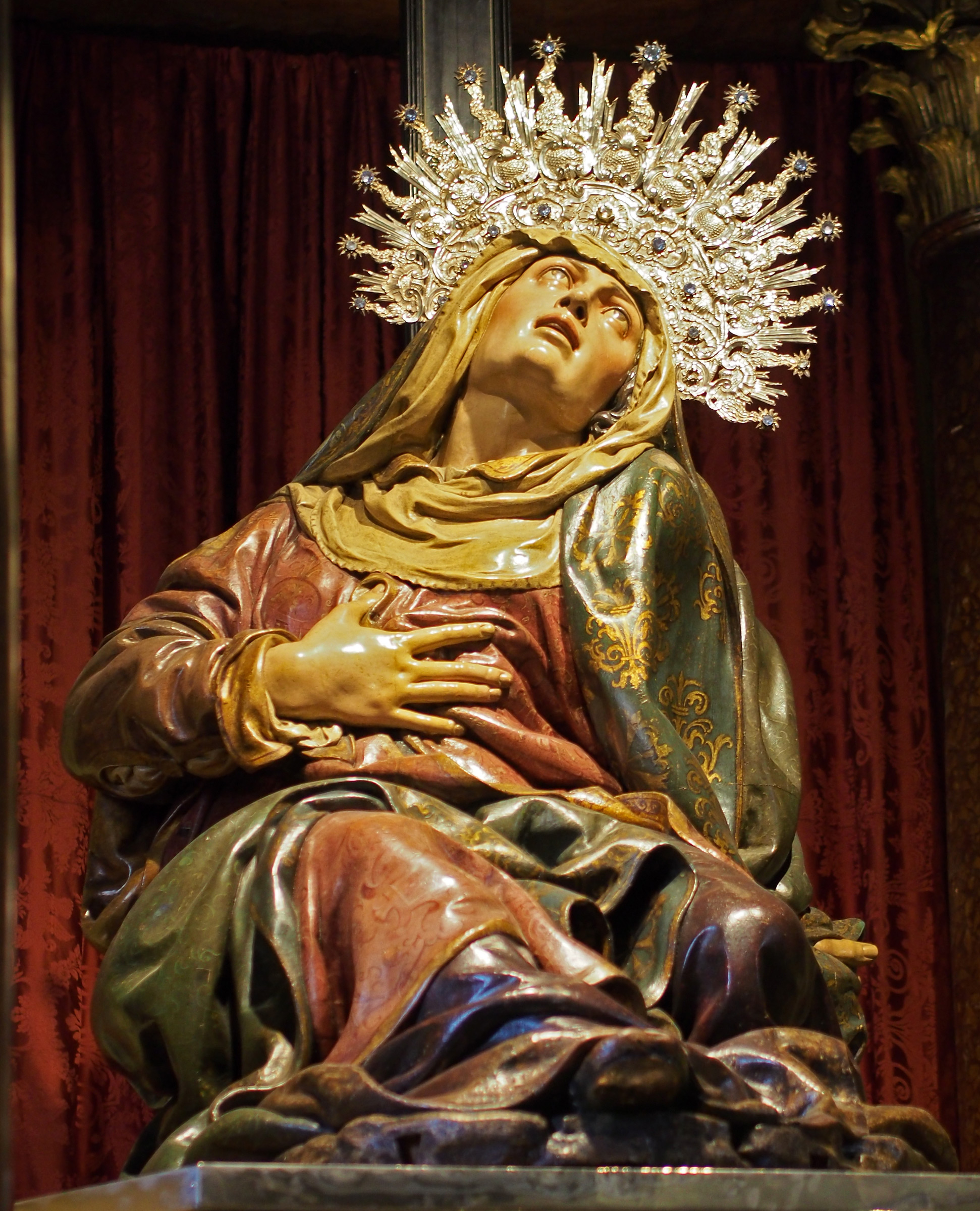 Virgen de las Angustias, c. 1571, por Juan de Juni. Iglesia de las Angustias, Valladolid.